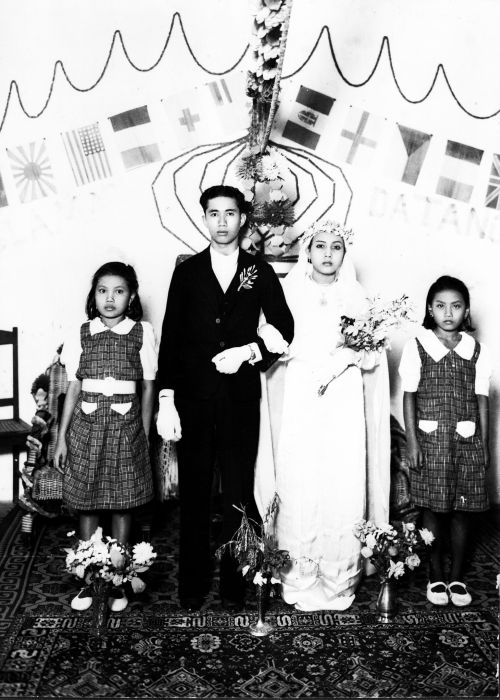 Foto. Indonesisch huwelijksportret van een bruidspaar in Europese kleding met twee bruidsmeisjes